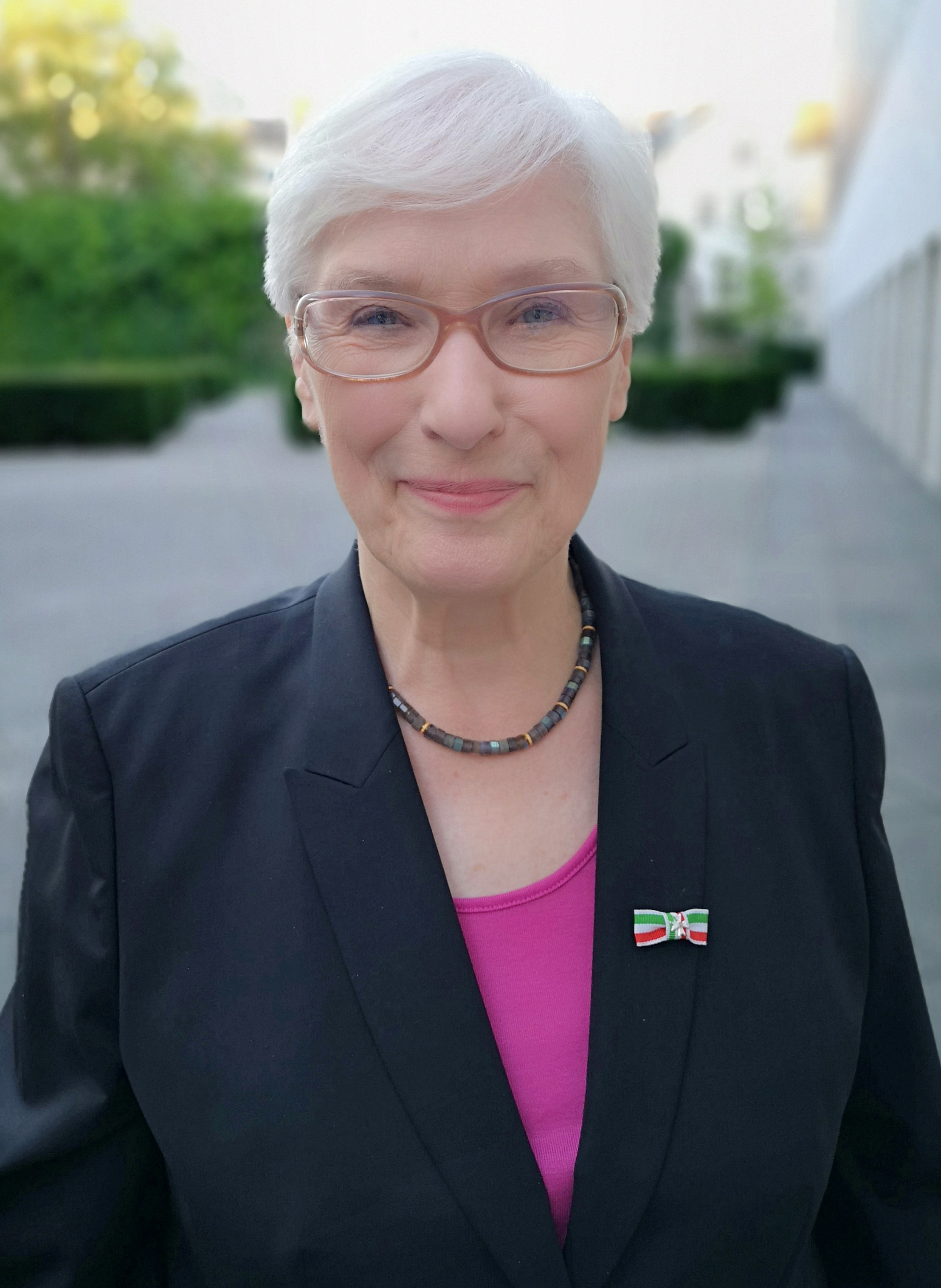 Irmgard Schwaetzer (2018), Verleihung des Verdienstordens des Landes Nordrhein-Westfalen 2018